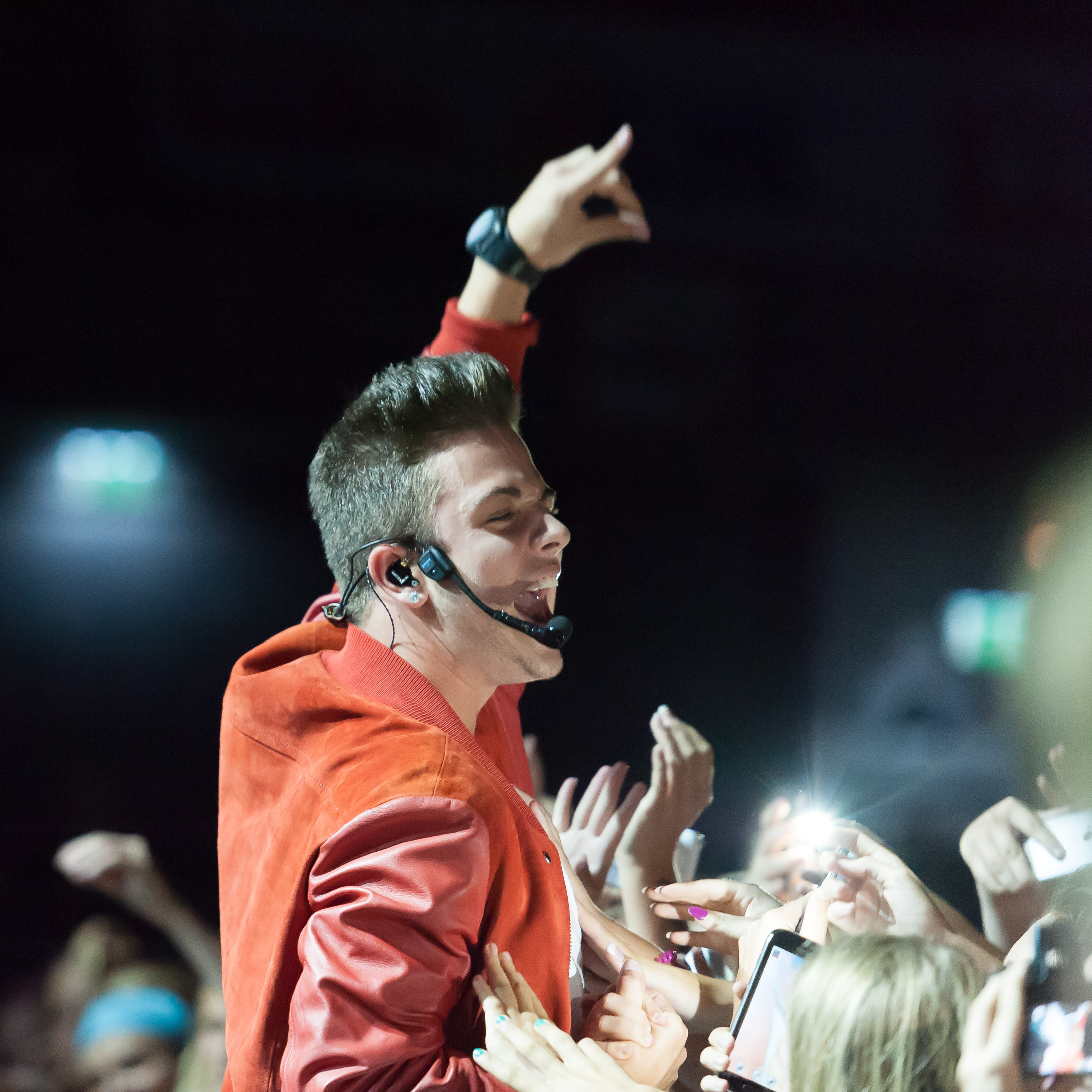 DSDS - Live on Tour 27. Juli 2014, Stadthalle Wien Luca Hänni